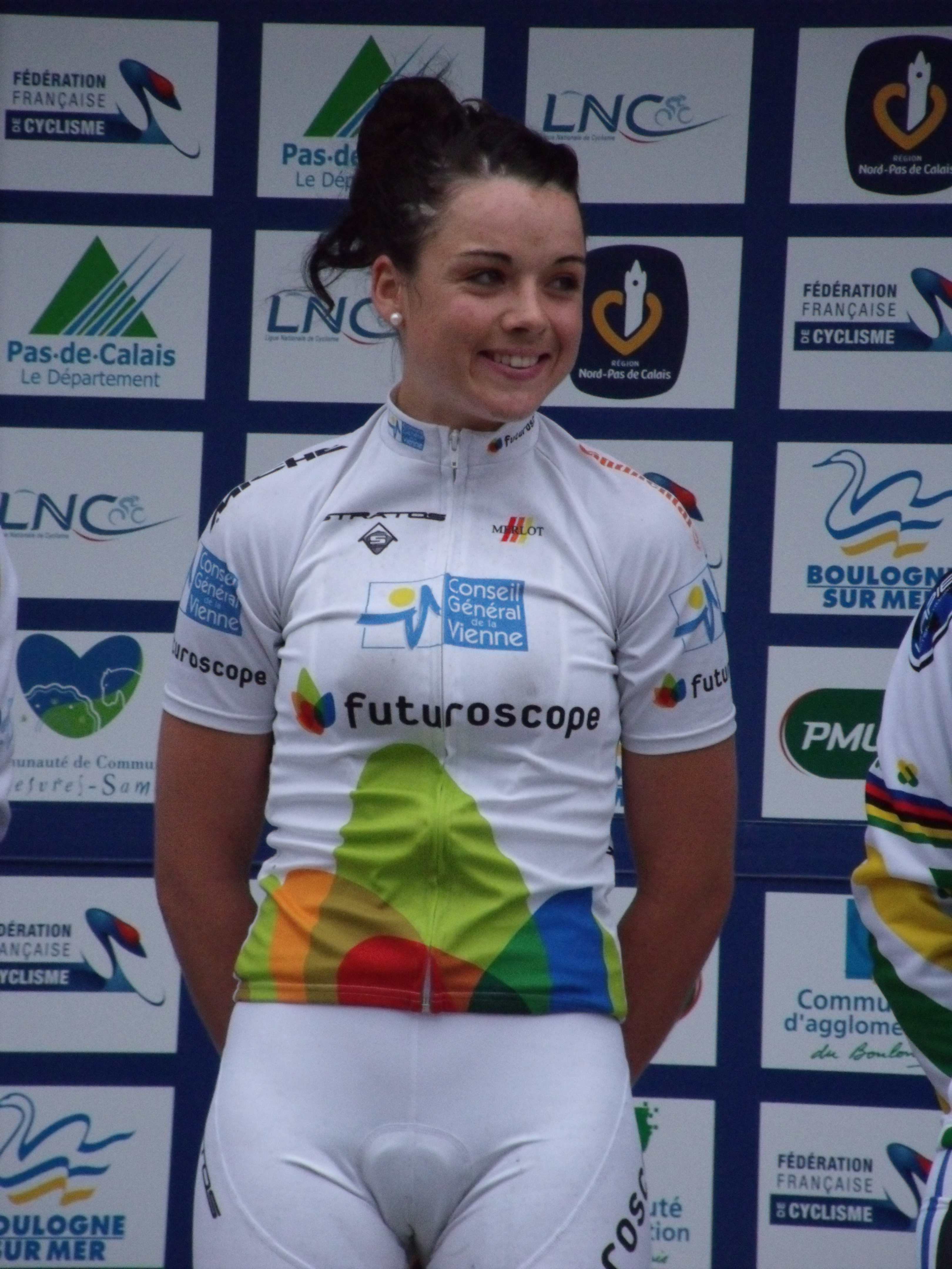 Audrey Cordon sur le podium du championnat de France sur route espoirs 2011